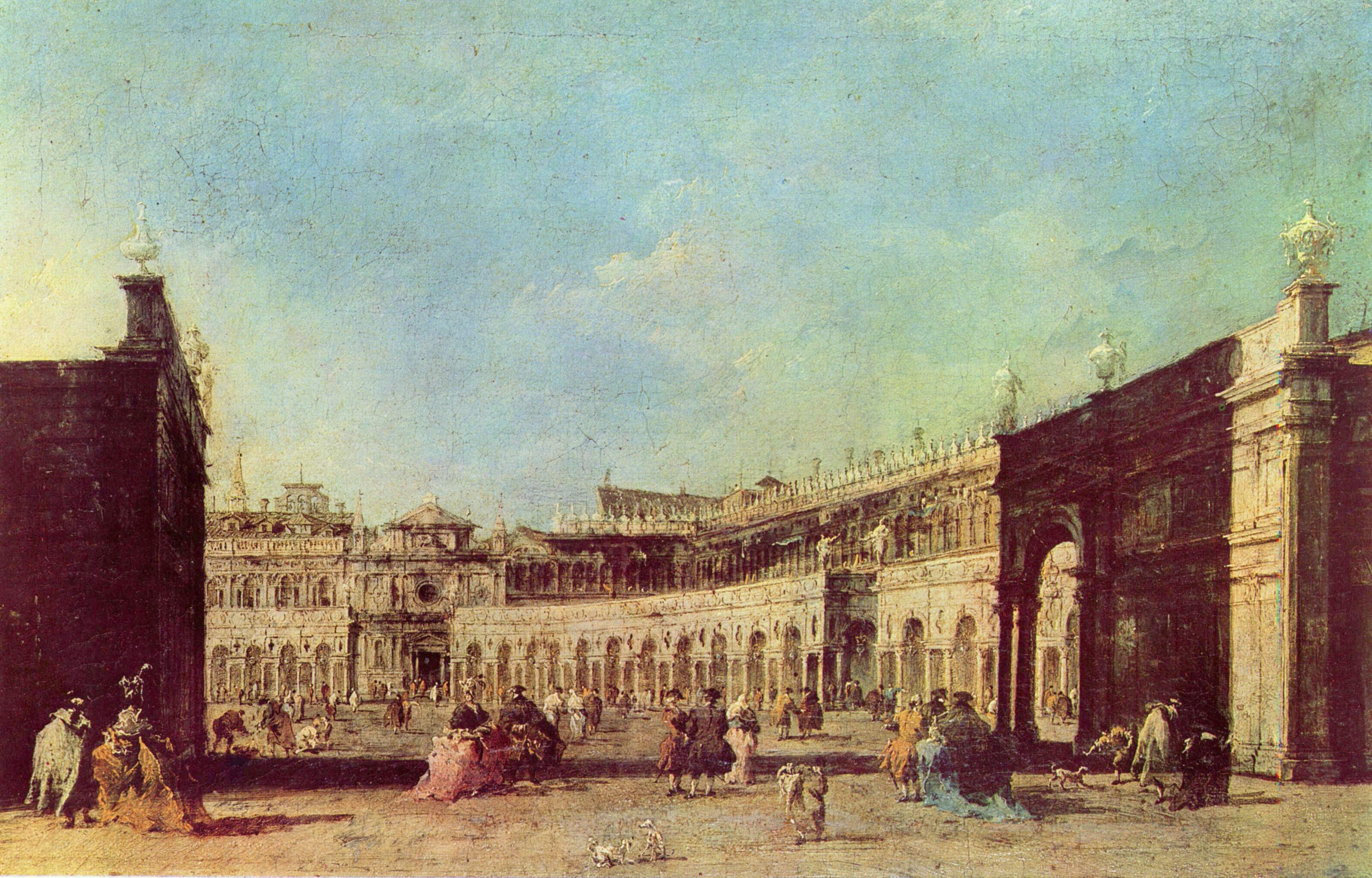 Piazza San Marco a Venezia, dal lato opposto alla basilica. Vi si osservano padiglioni in legno provvisori, costruiti per l'annuale "fiera della Sensa" (la festa dell'Ascensione). Sul fondo, la facciata della chiesa del Sansovino, demolita da Napoleone.